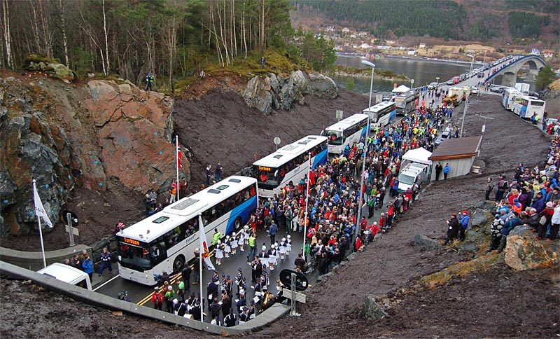 Eiksund Tunnel and Eiksund Bridge